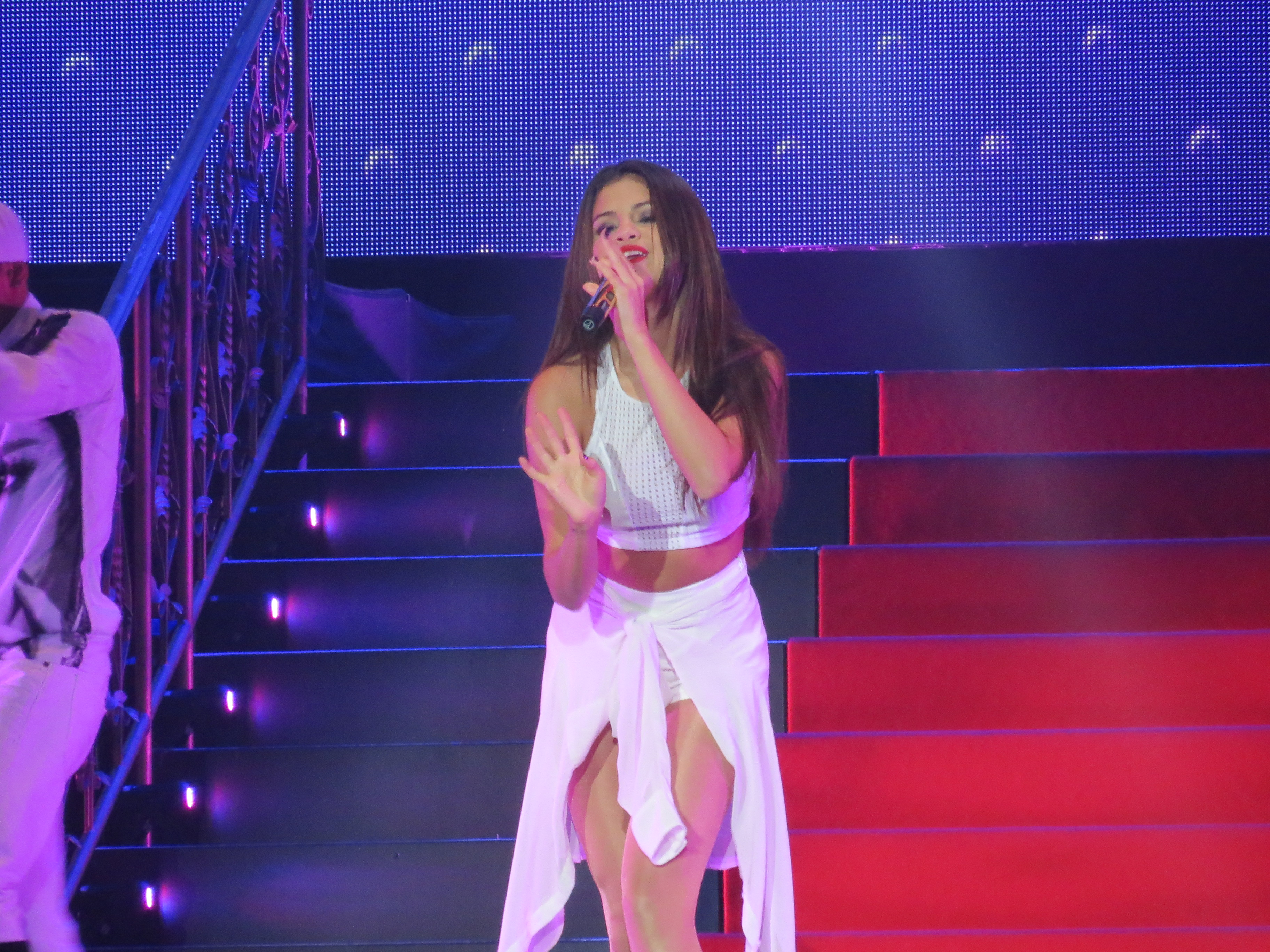 Selena Gomez StarsDance Nov 2013 San Diego, CA